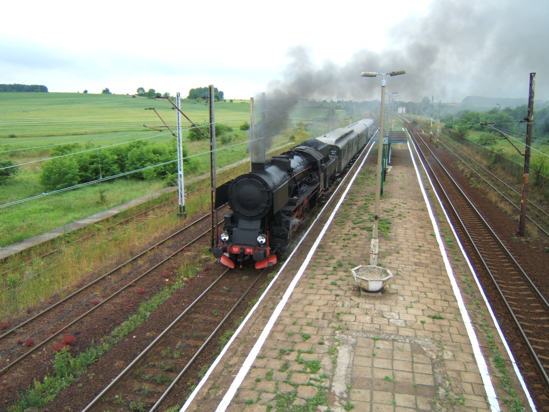 Parowóz Ty2-953 z pociągiem retro, zorganizowanym dla uczczenia 150-lecia dworca kolejowego w Tarnowskich Górach, mija stację Nakło Śląskie, zmierzając do Radzionkowa.